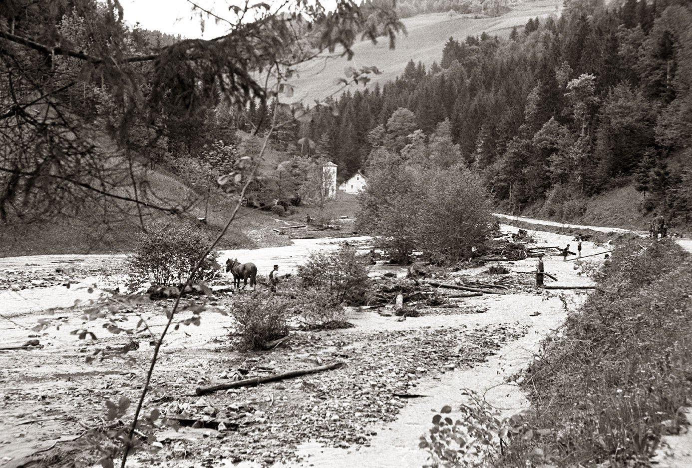 Neurje nad Zrečami